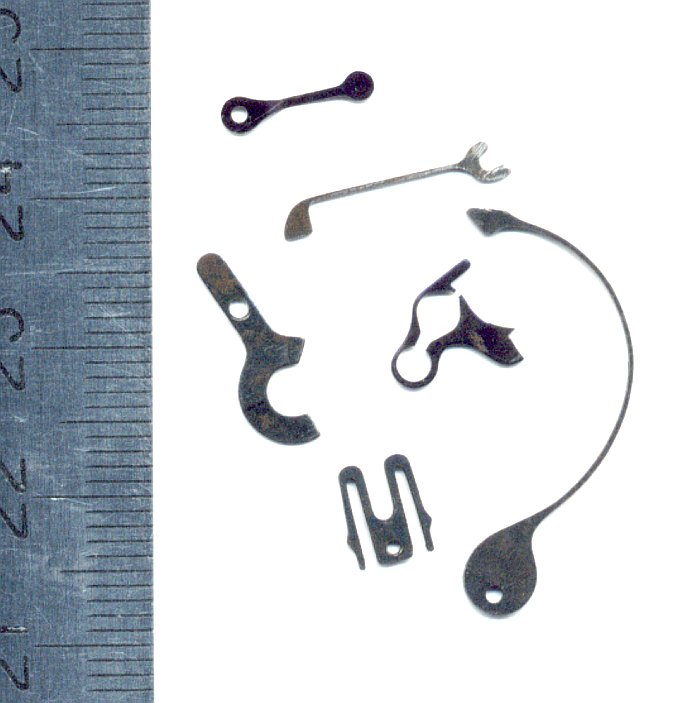 Sprężyny płaskie z mechanizmu zegarkowego. Own work 2007-01-20